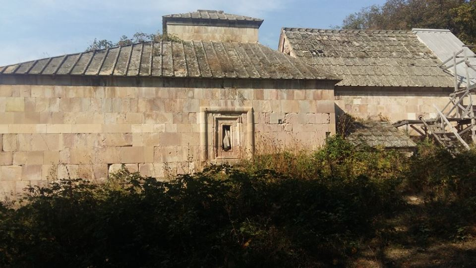 Մշկավանք